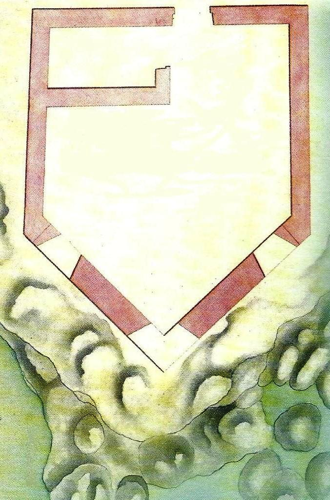 Forte de São Jorge. MACHADO, Francisco Xavier. "Revista dos Fortes e Redutos da Ilha Terceira" (1772). in MARTINS, José Salgado, "Património Edificado da Ilha Terceira: o Passado e o Presente". Separata da "Atlântida", vol. LII, 2007. p. 44.